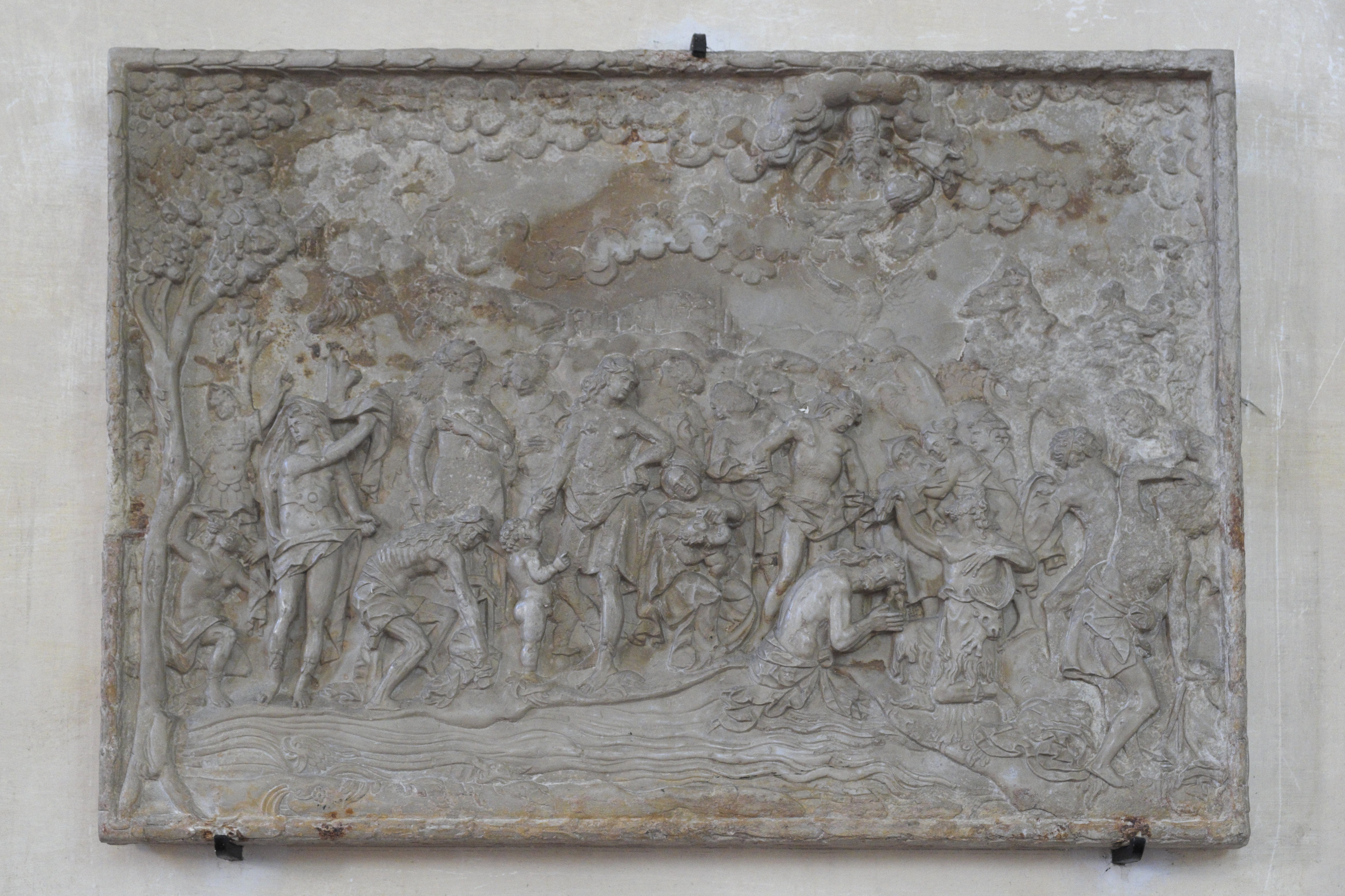 Katholische Pfarrkirche Saint-Julien-de-Brioude in Marolles-en-Brie im Département Val-de-Marne (Île-de-France/Frankreich), Alabasterrelief aus dem 16. Jahrhundert; Darstellung: Taufe Jesu